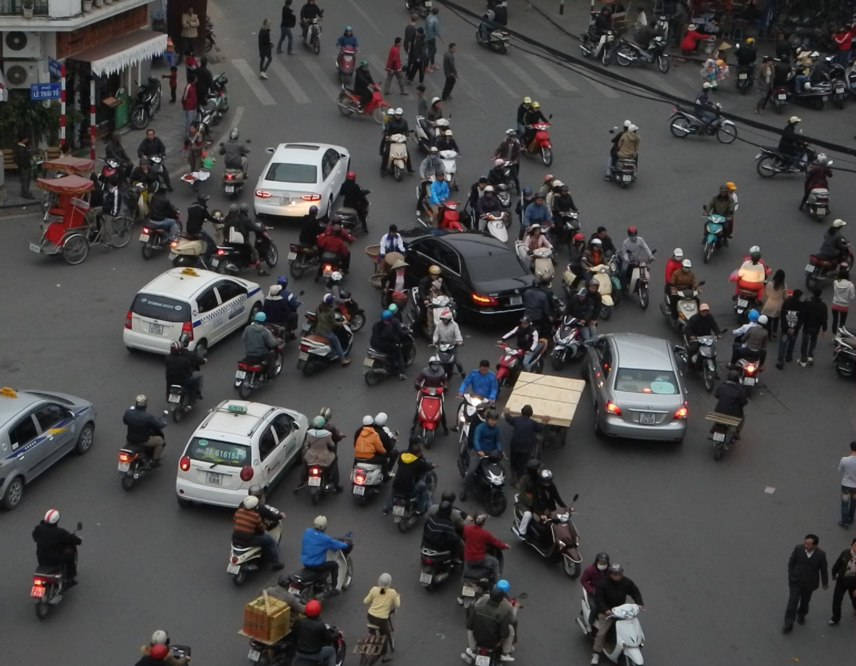 Hanoi-Straßenverkehr09